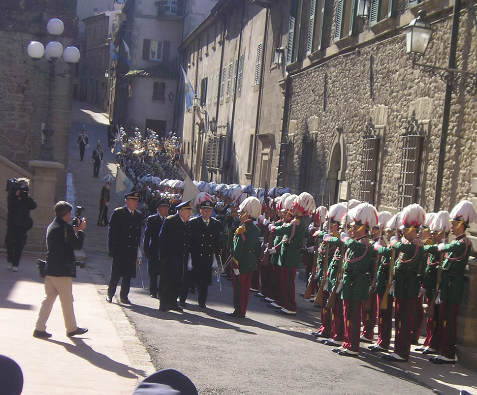 Squadra della Guardia di Rocca Nucleo Uniformato alla Rassegna militare del 25 marzo